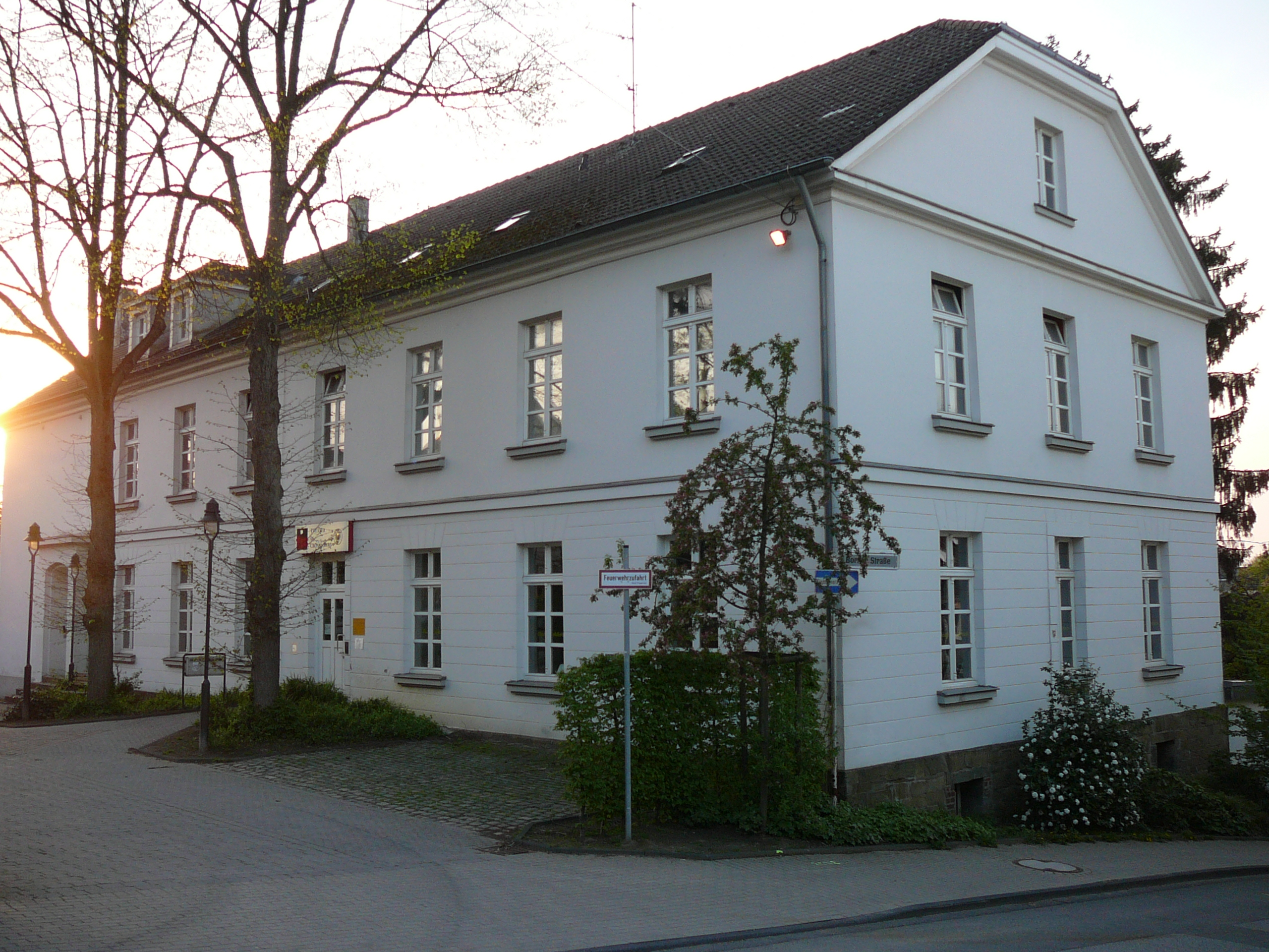 Borner Straße, Wuppertal